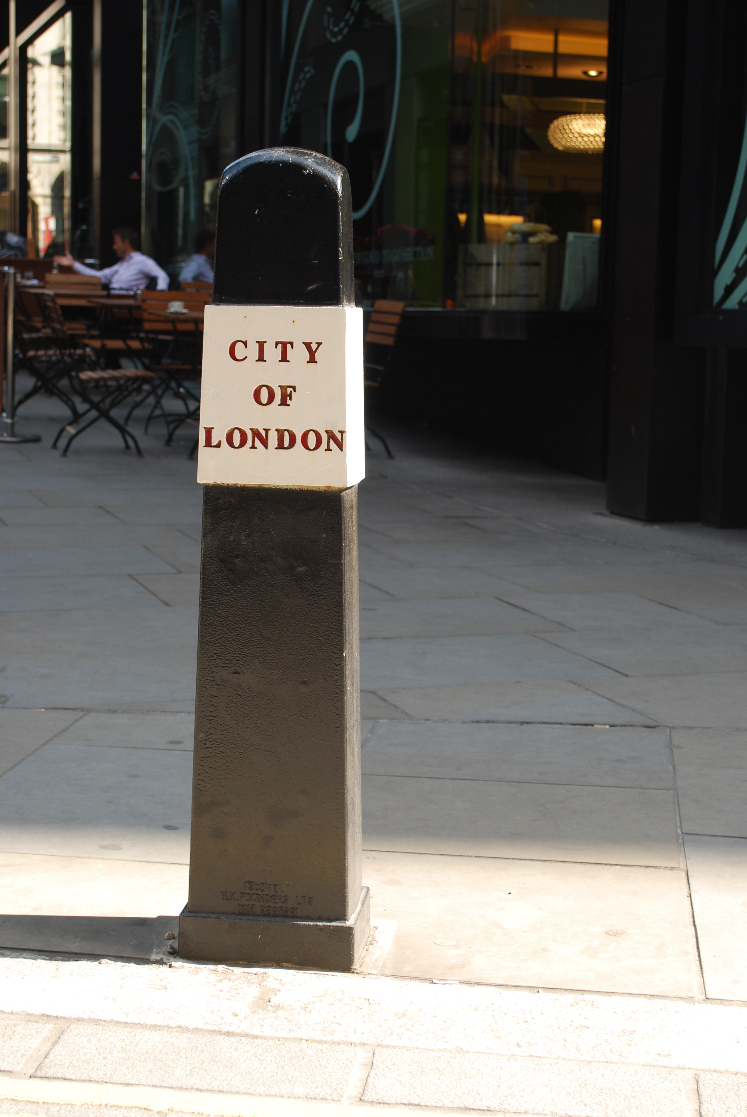 City of Londen Straatmarkering